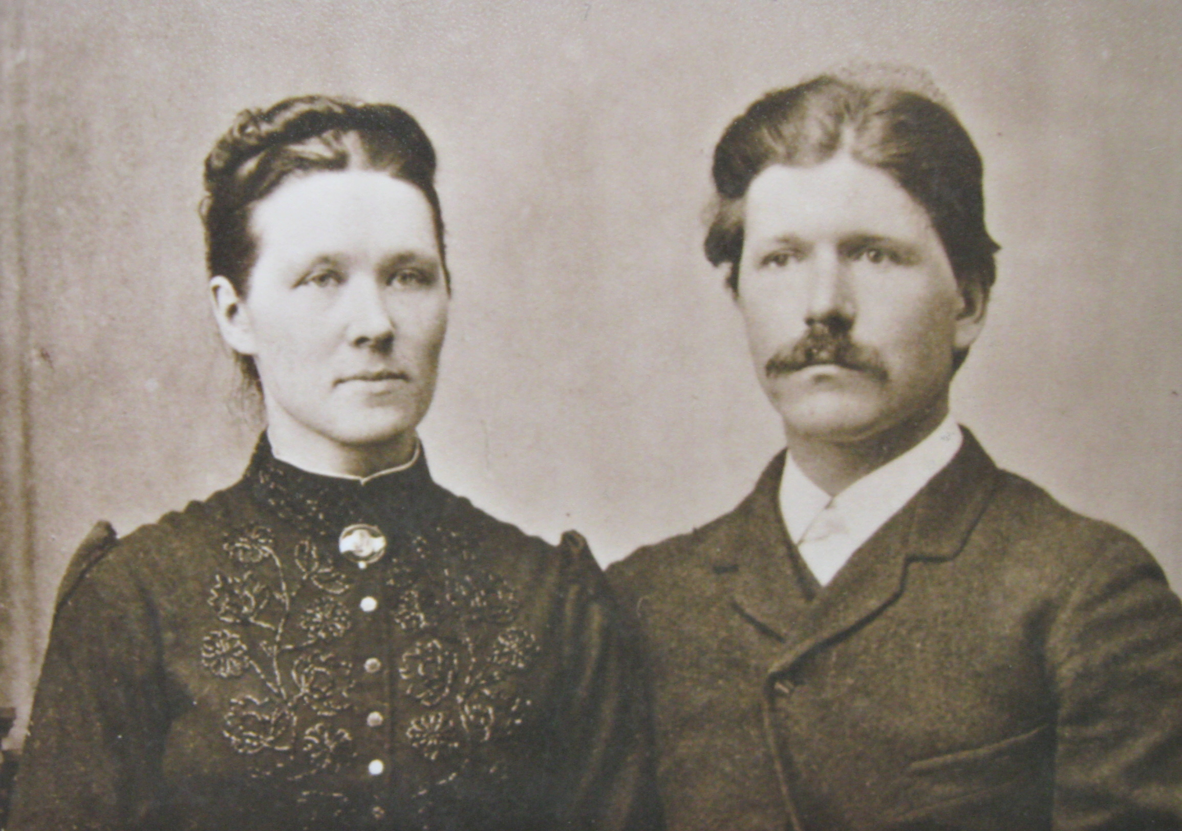 Ģimenes portrets - Jānis un Ieva Ozoliņi